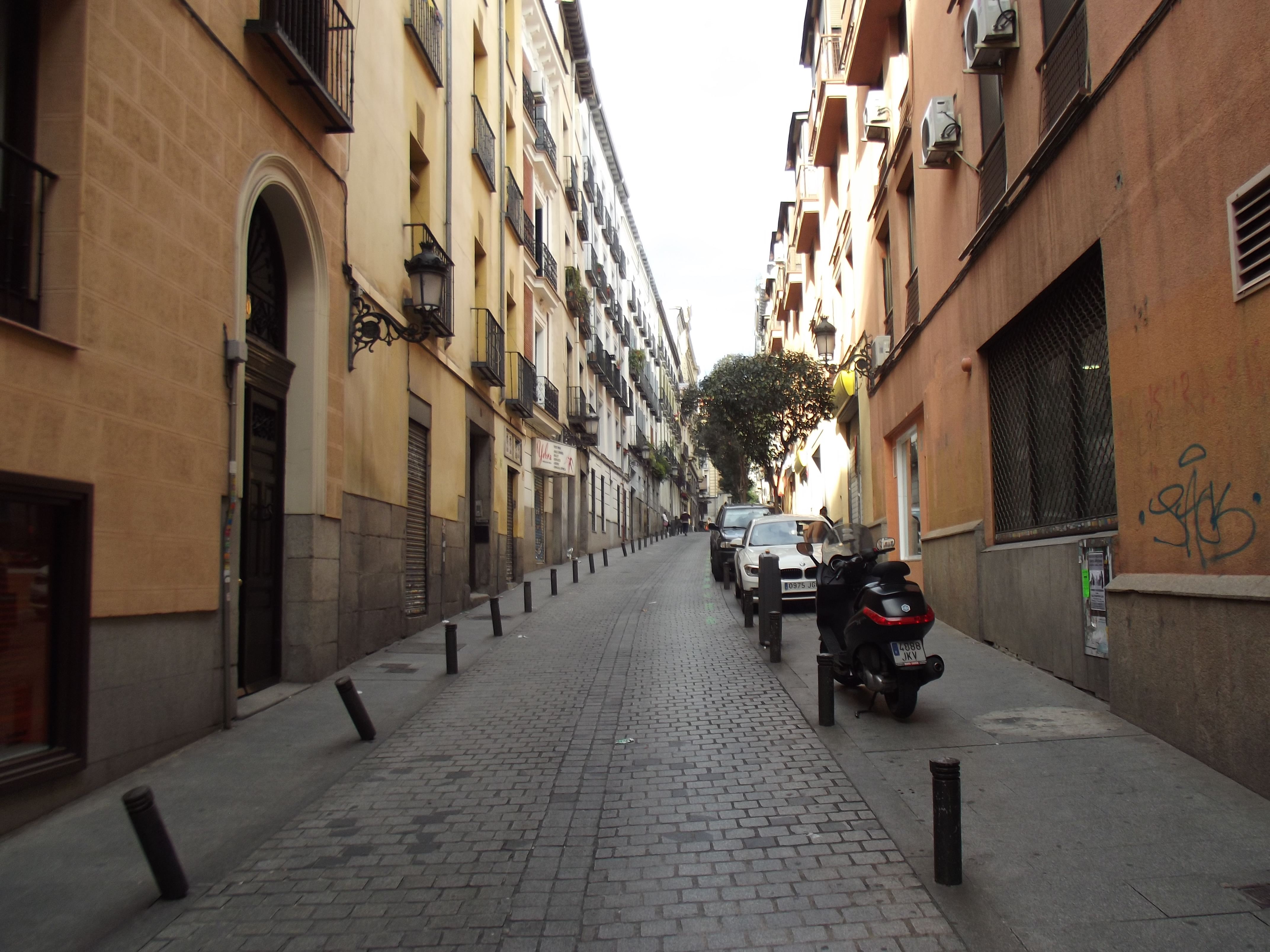 Calle de Luis Vélez de Guevara, Madrid.